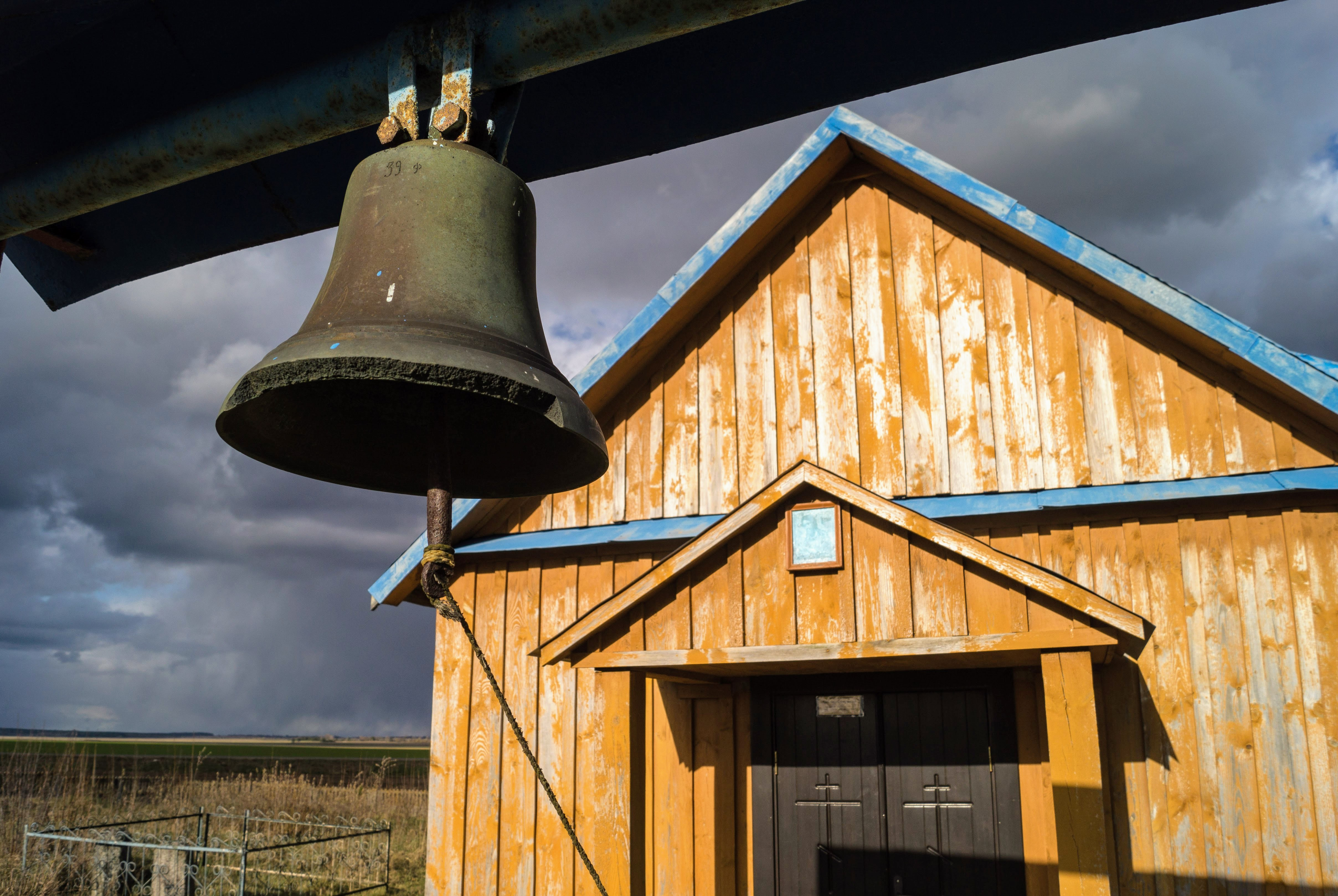 Свята-Іаана-Прадцечанская царква (Бараўцы)